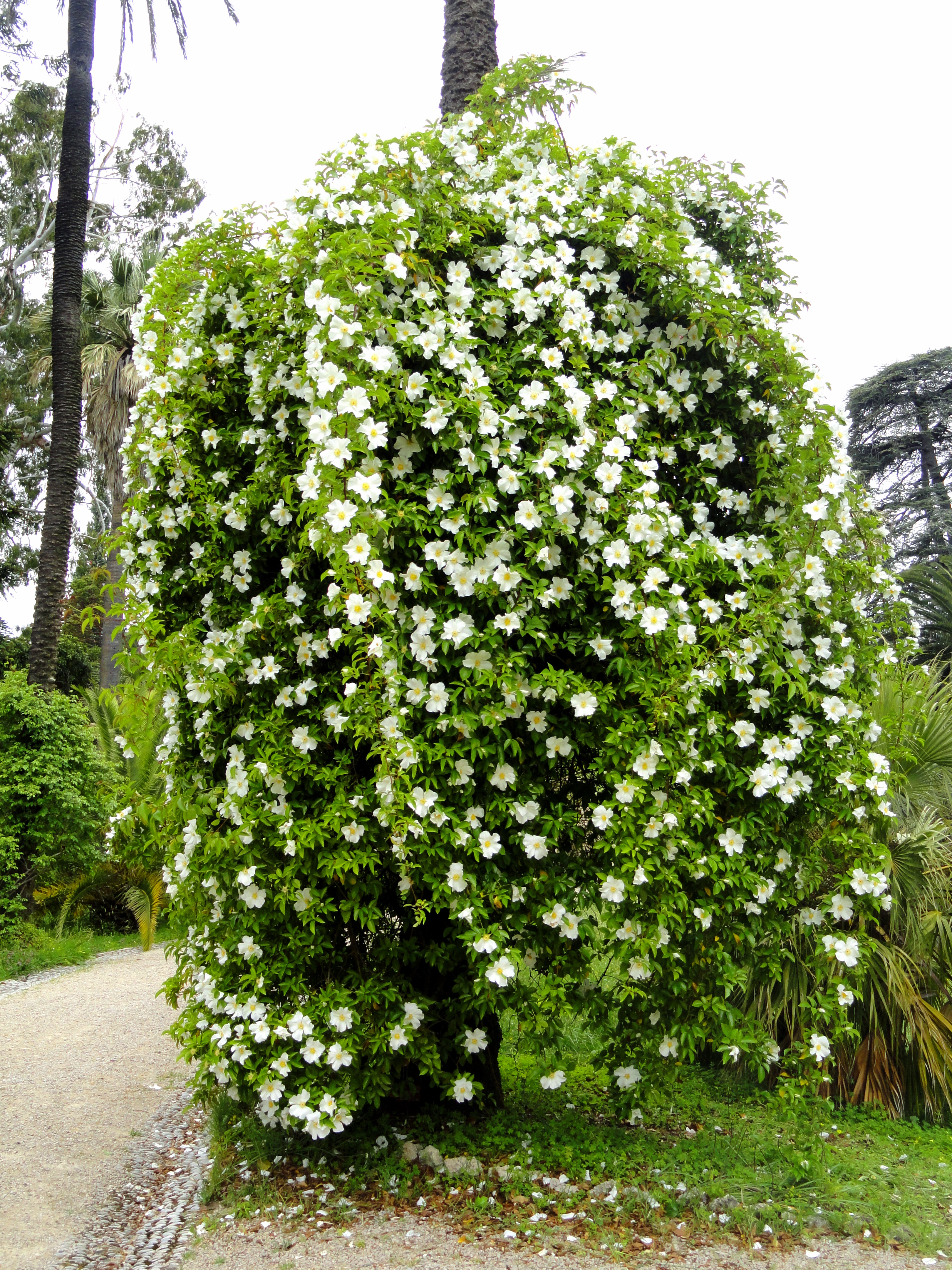 Rosa laevigata specimen in the Jardin botanique de la Villa Thuret, Antibes Juan-les-Pins, Alpes-Maritimes,France.